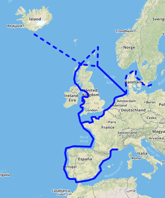 Réalisé avec Open Street Map et